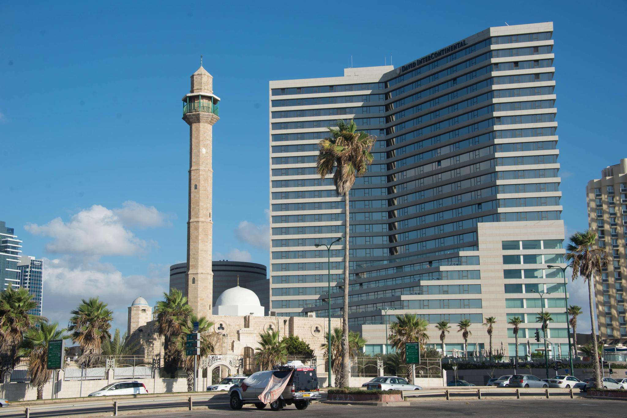 Tel-Aviv